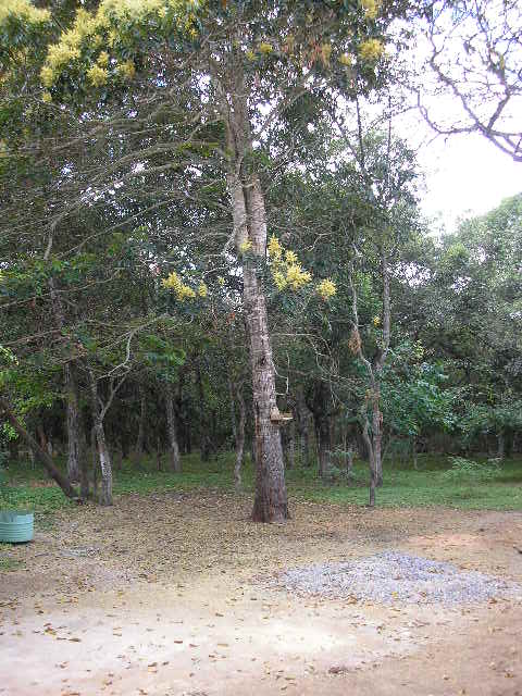 Árvore de carvoeiro, cientificamente Tachigali paniculata. Autor: Denis Conrado.